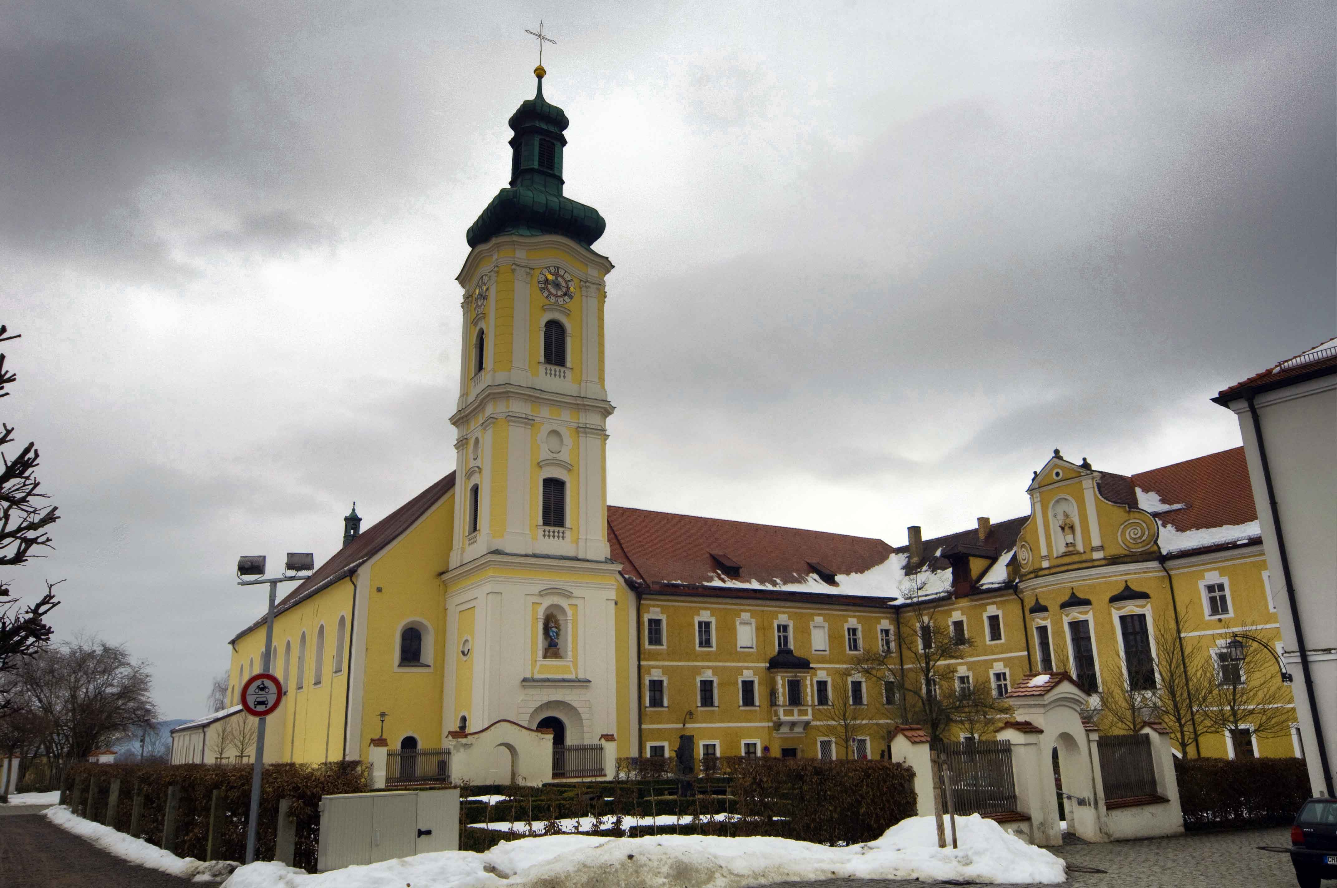 Kirchenansicht Kloster Walderbach, Bayern